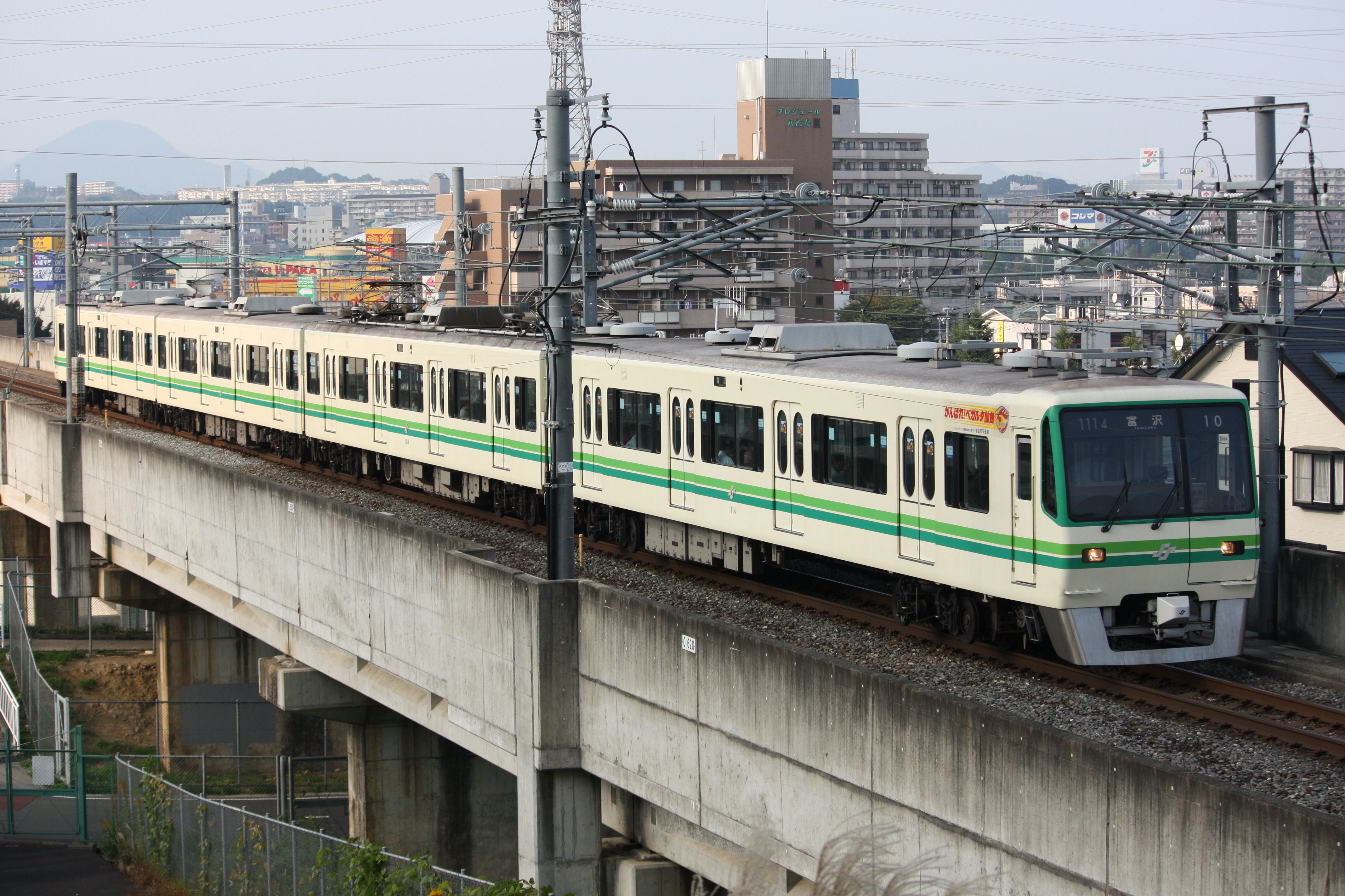 仙台市交通局1000系電車（八乙女～黒松間にて）